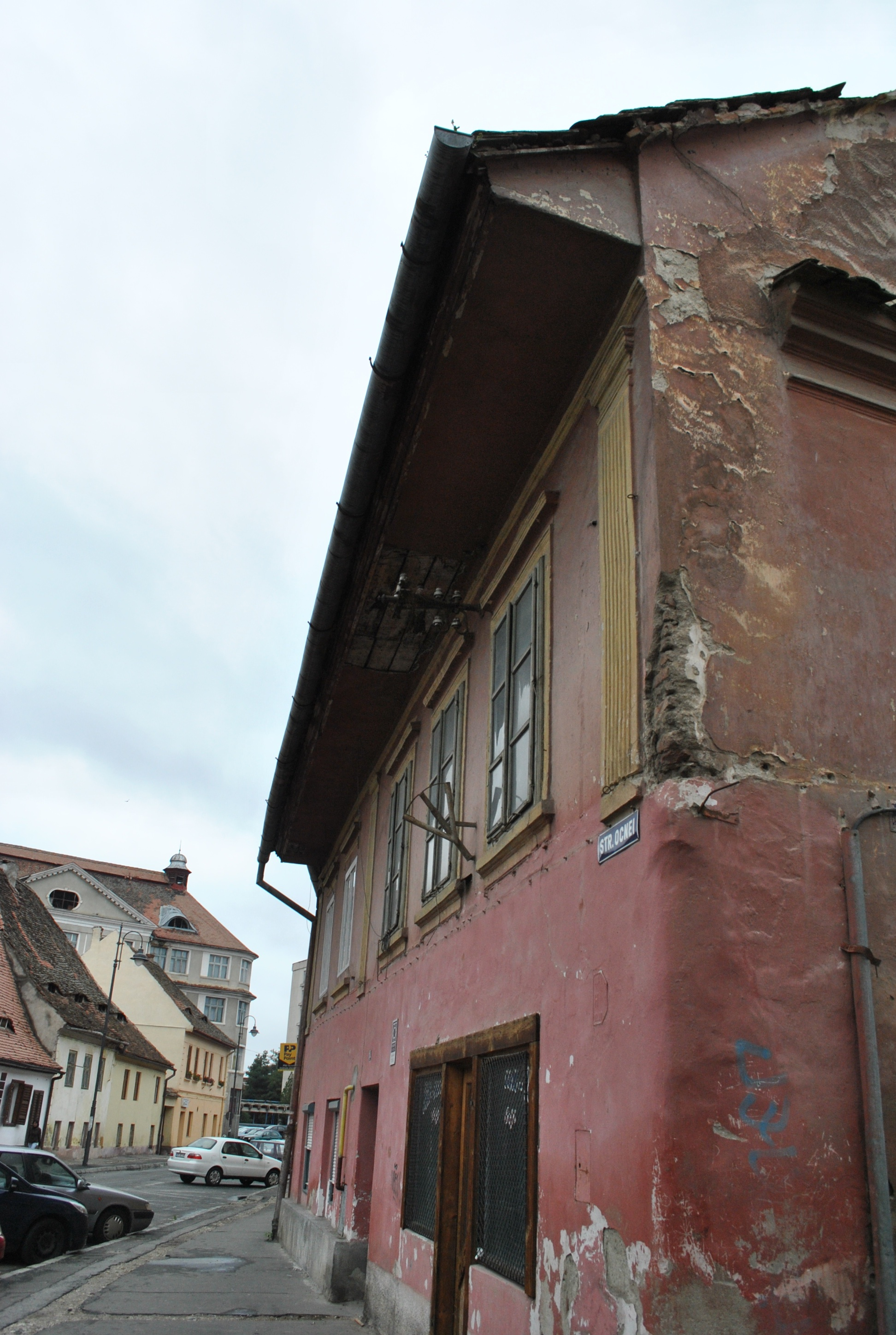 Casă, sec. XIV, sf. sec. XV, 1820 - 1830